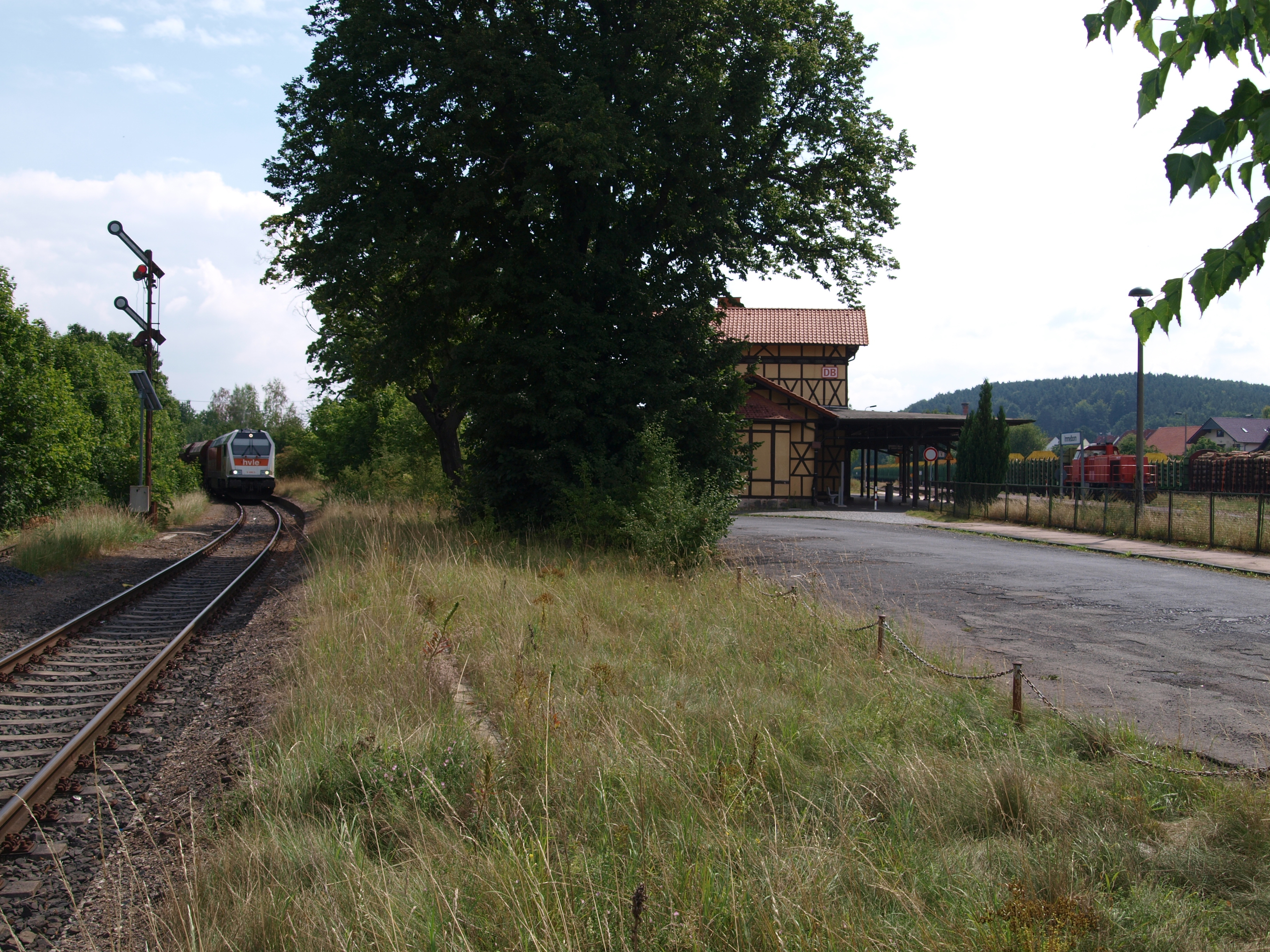 Ausfahrt aus Immelborn